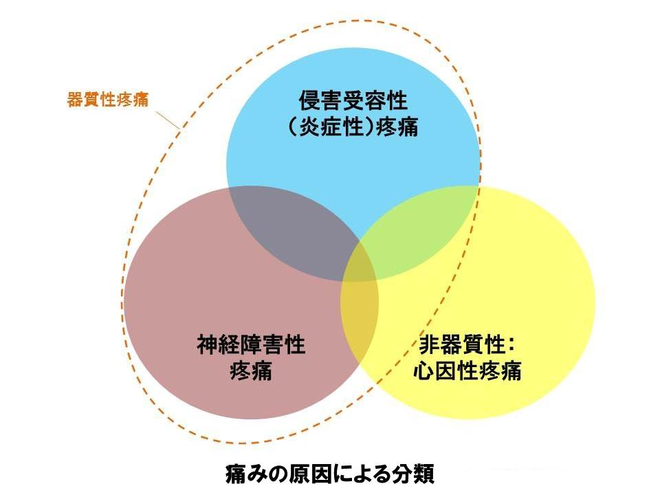 痛みの原因による分類